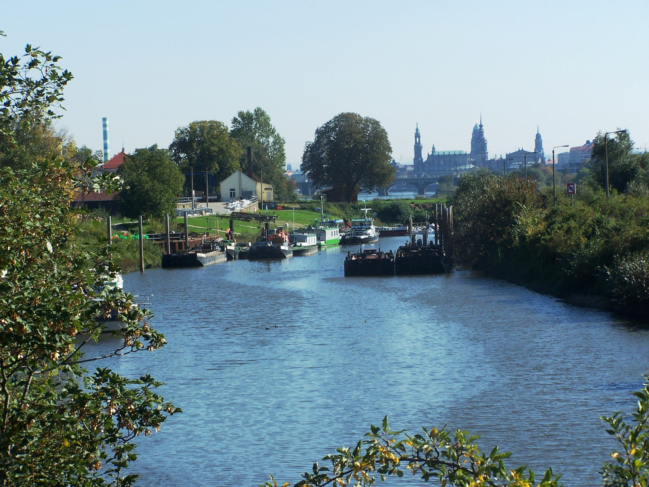 Elbhafen Dresden-Pieschen